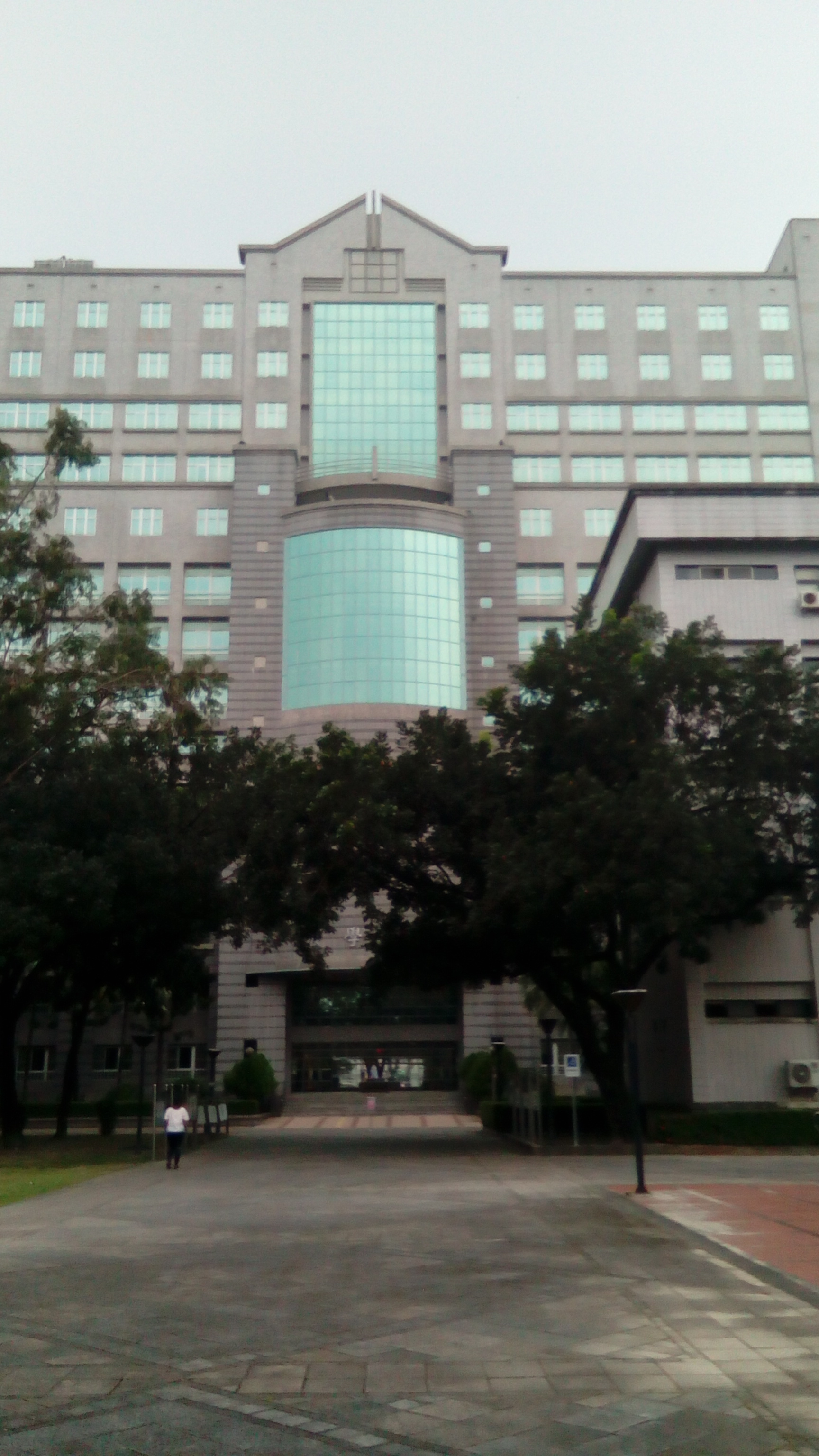 從北往南拍攝